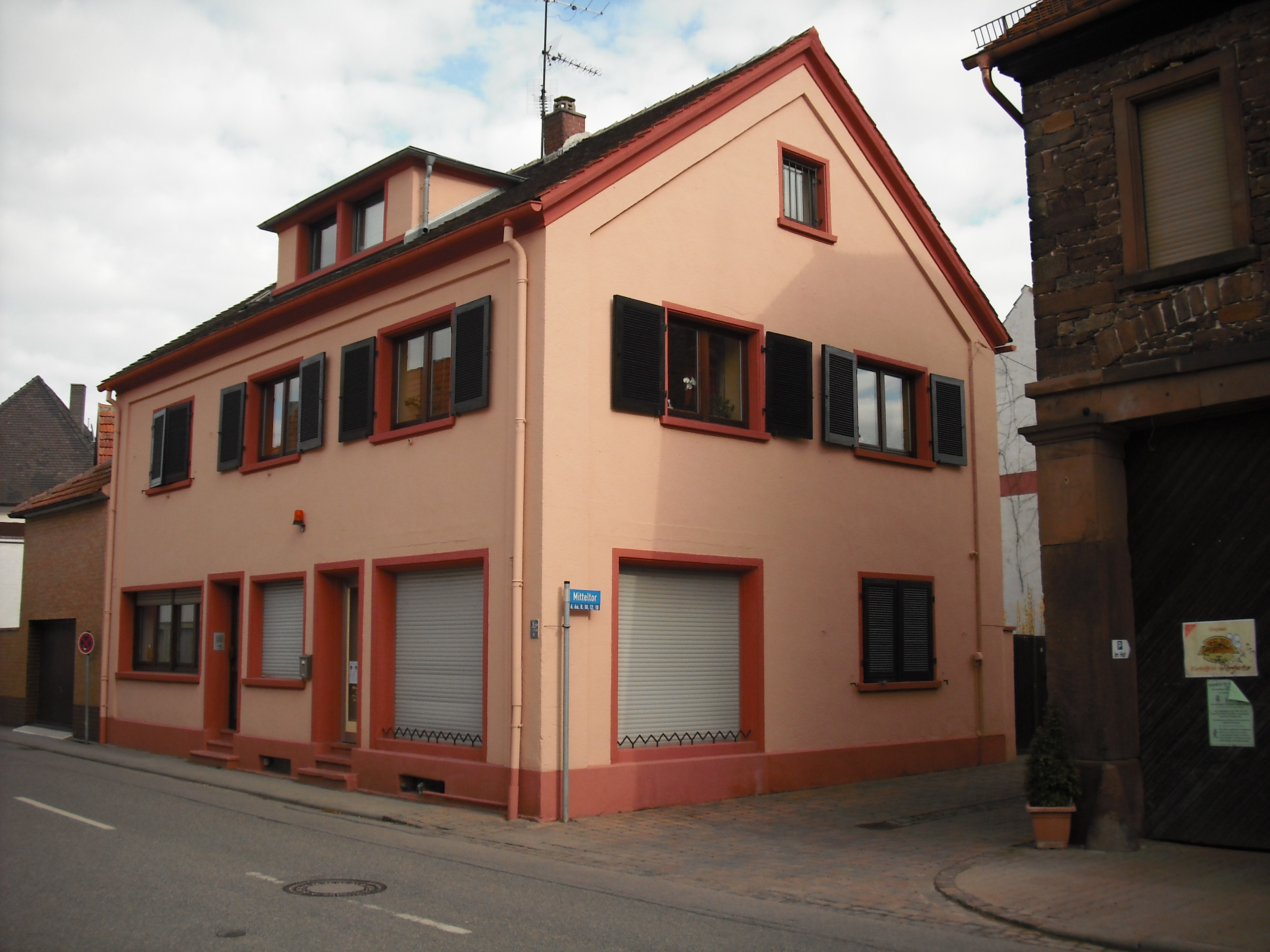 Ehemalige Synagoge von Dirmstein, aufgegeben um 1913, zum Wohnhaus umgebaut in den 1930er Jahren